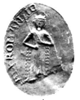 Sceaux de Marie de Brienne